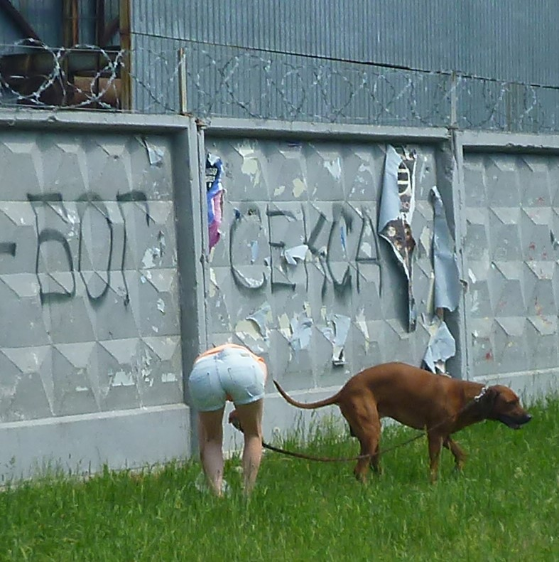 Женщина убирает фекалии за собакой в Екатеринбурге 10 июня 2020 года